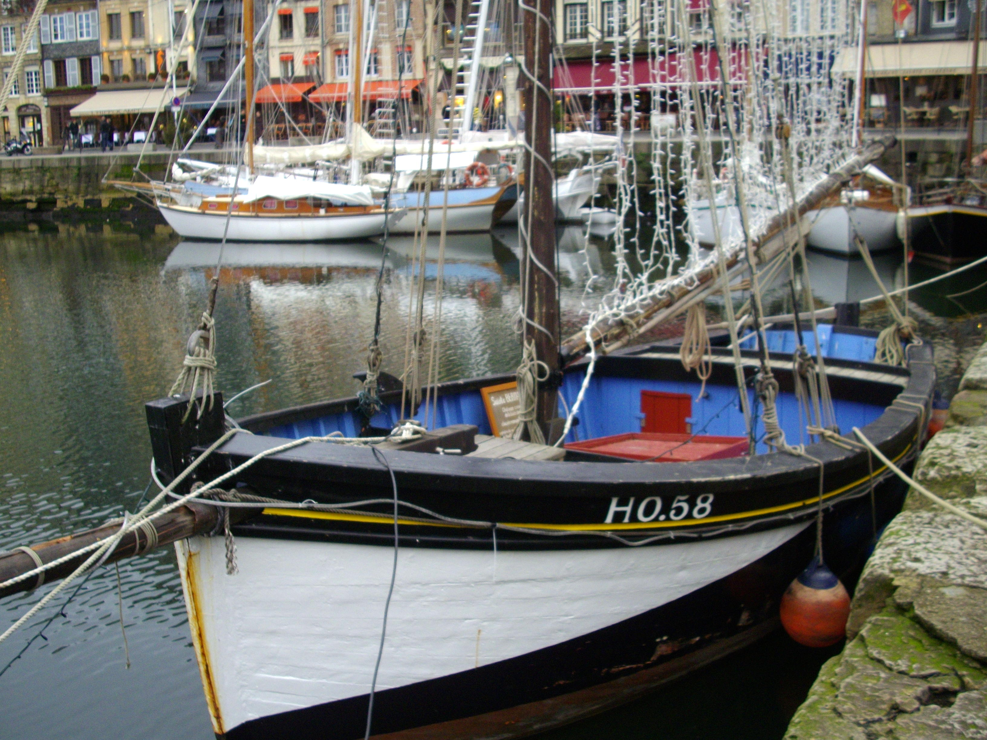 Le cotre Sainte-Bernadette (Honfleur)